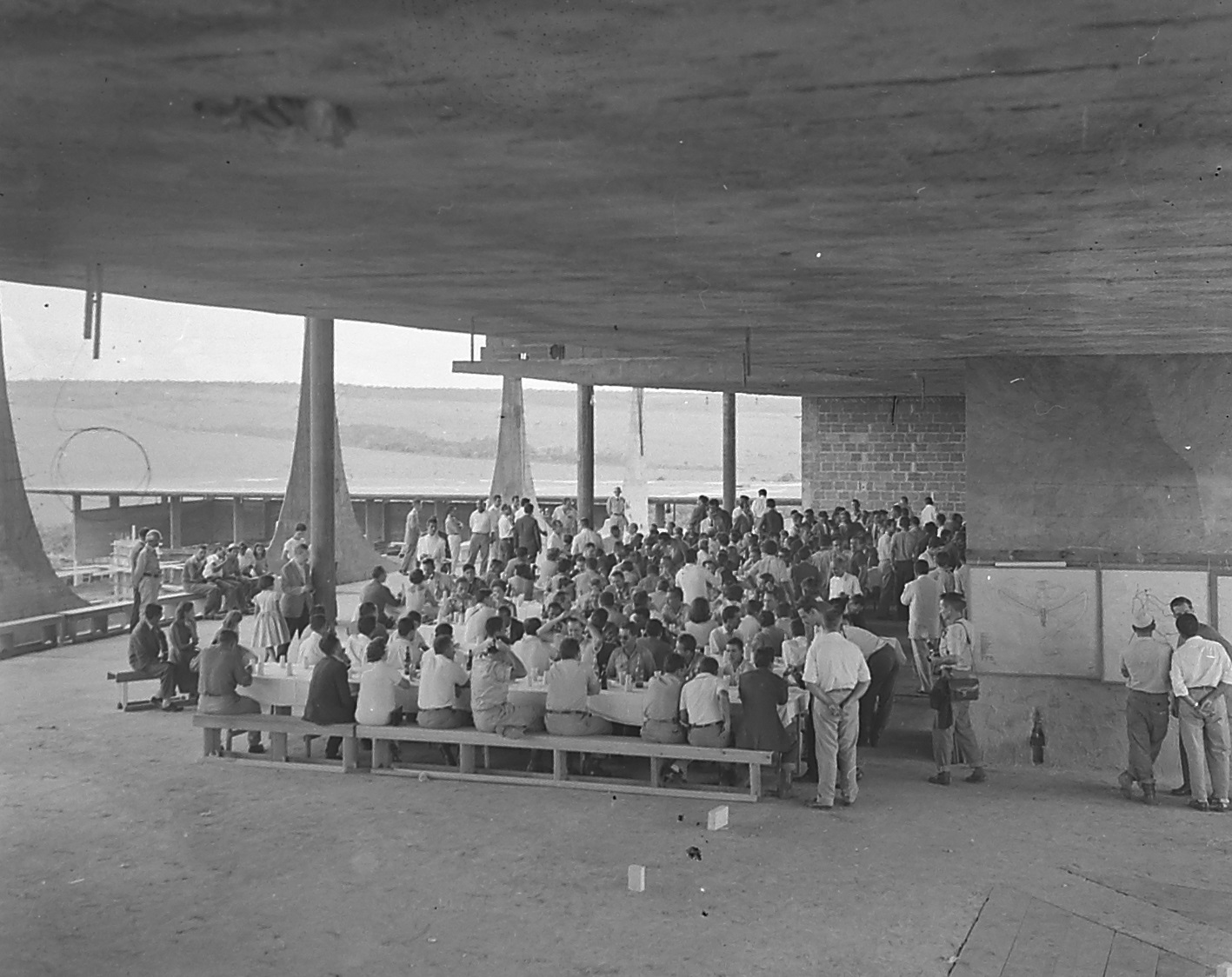 Imagem do Fundo Agência Nacional, do Arquivo Nacional